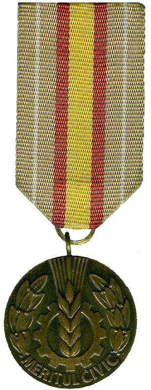 Медаль Республики Молдова «Meritul Civic»